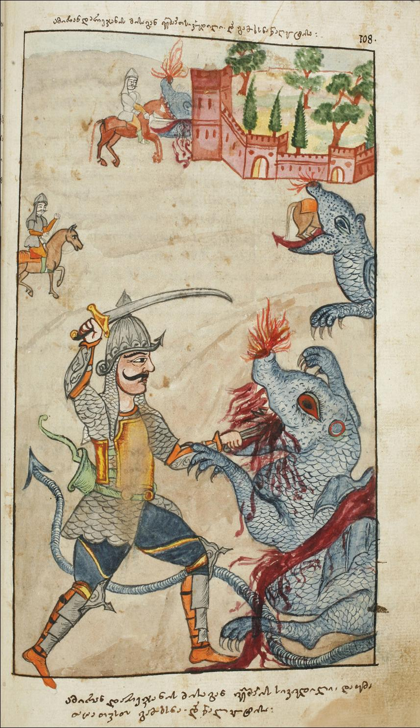 ამირანდარეჯანიანი (H-384)